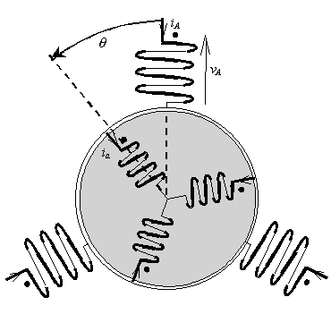 Schéma des enroulements d'un moteur électrique